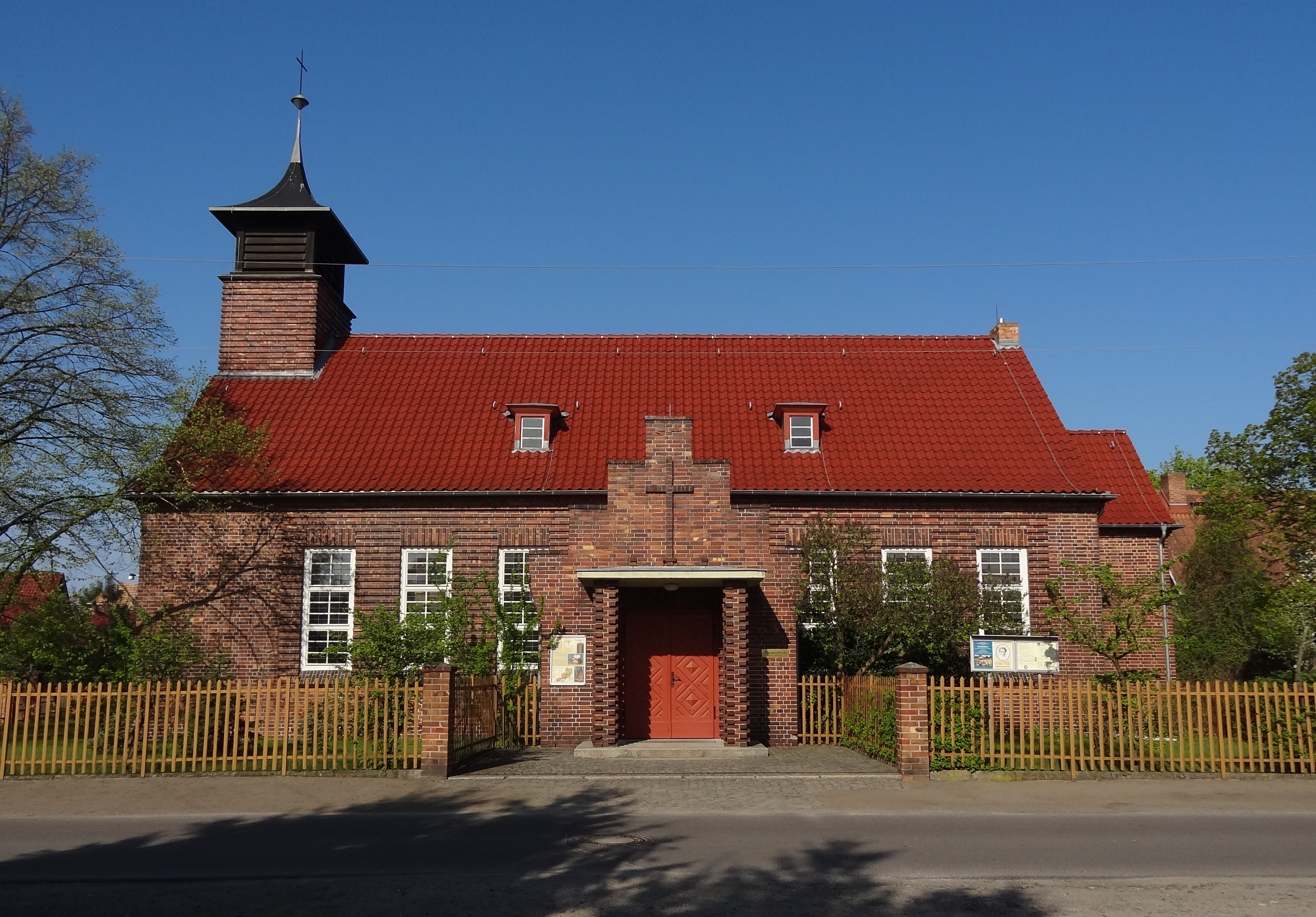 Zinzendorfkirche